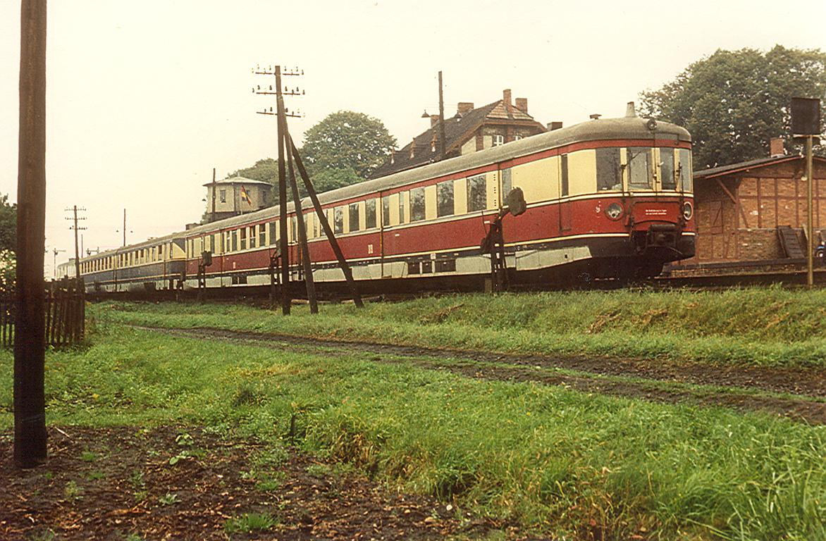 VT 137 288